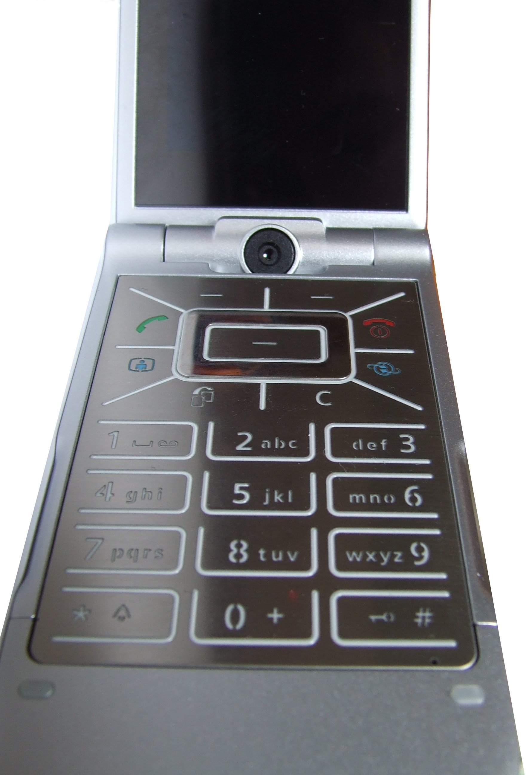 BenQ-Siemens EF81